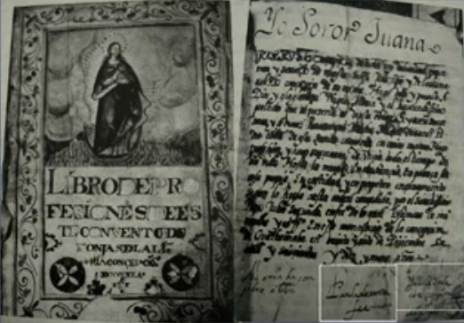 Libro de profesiones del Convento de la Inmaculada Concepción de la ciudad de Santiago de los Caballeros de Guatemala. Siglo XVII.